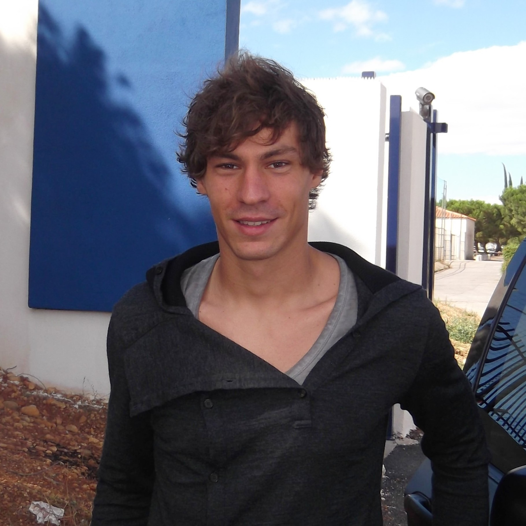 Benjamin Stambouli (MHSC), été 2013.